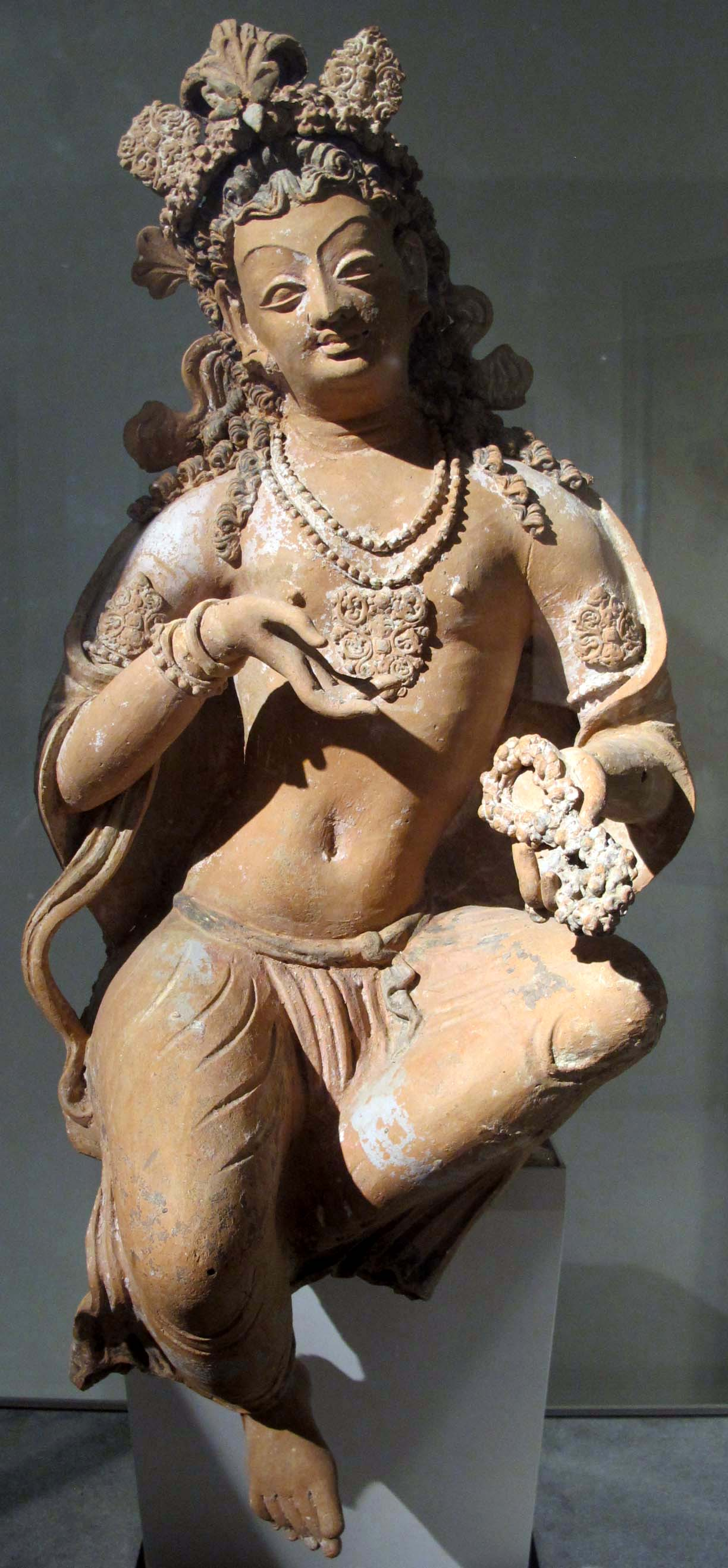 Le bodhisattva Devata assis dans la pose de délassement. VIIe - VIIIe siècle. Asie centrale, Fondukistan, vallée de Ghorband, Gandhâra. Terre séchée polychrome, H. 72 cm. Musée des Arts Asiatiques Guimet, Paris